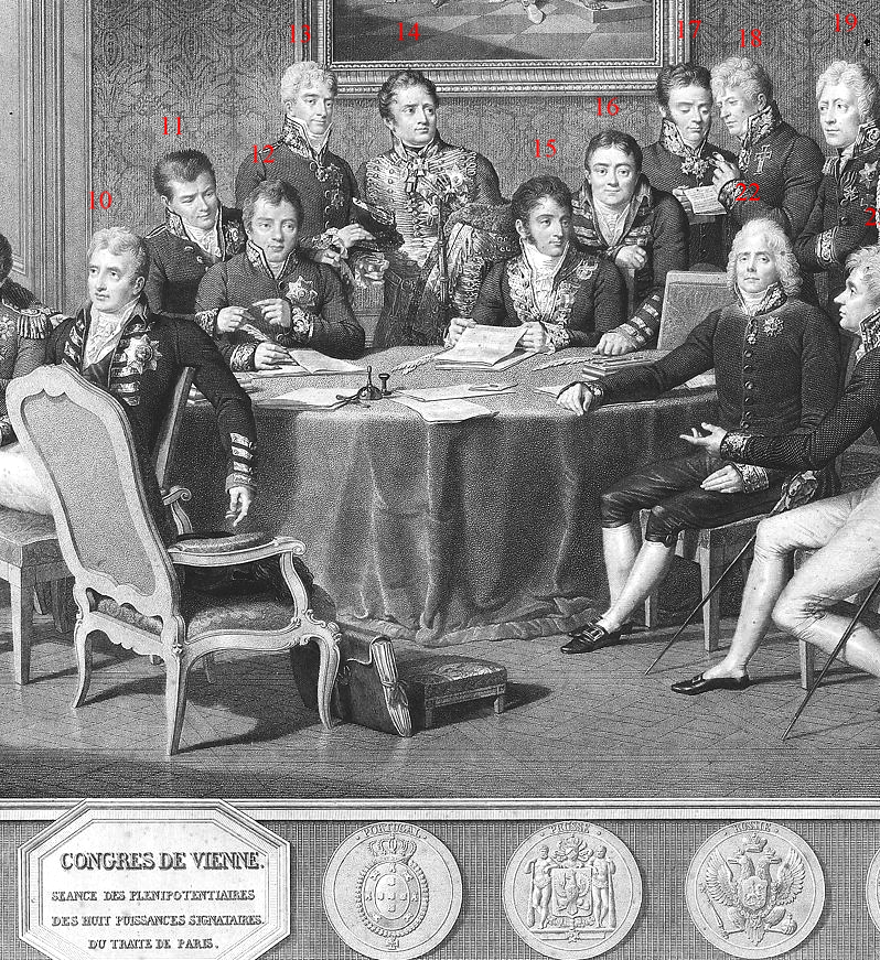 10. Robert Stewart, Viscount Castlereagh (UK) 11. Emmerich Joseph de Dalberg (France) 12. Baron Johann von Wessenberg-Ampringen (Austria) 13. Prince Andrey Kirillovich Razumovsky (Russia) 14. Charles Stewart, 1st Baron Stewart (UK) 15. Pedro Gómez Labrador, Marquis of Labrador (Spain) 16. Richard Le Poer Trench, 2nd Earl of Clancarty (UK) 17. Nikolaus von Wacken (Recorder) (Österreichischer Staatskanzleirat, Freiherr 1823) 18. Friedrich von Gentz (Congress Secretary) 19. Baron Friedrich Wilhelm Christian Karl Ferdinand von Humboldt (Prussia) 21. Prince Karl August von Hardenberg (Prussia) (Nr. 1 bis 9 und 20 sowie 22 und 23 nicht im Ausschnitt enthalten)